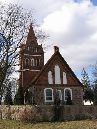 Kościół pw. Maryi Królowej Różańca Świętego w Bezrzeczu (powiat policki)